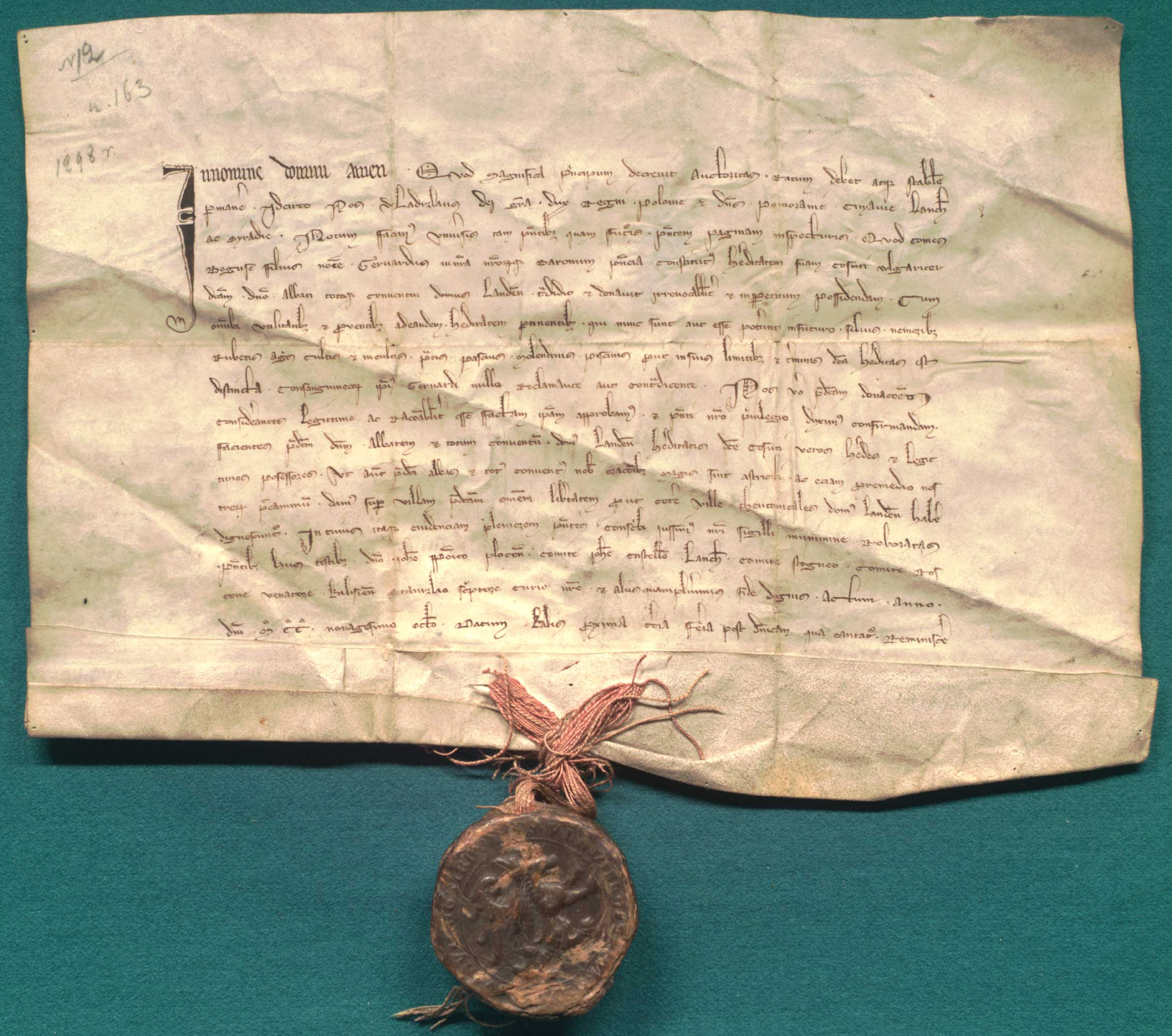 Władysław, ks. królestwa polskiego, pan Pomorza, Kujaw, Łęczycy i Sieradza, zatwierdza darowiznę wsi Koszuty przez komesa Gerwarda, syna Boguszy, na rzecz klasztoru cystersów w Lądzie. Język: łac. Opis zewnętrzny: oryg., 1 k. pergaminowa, 38 x 26,5 + 5 cm; pieczęć na sznurze